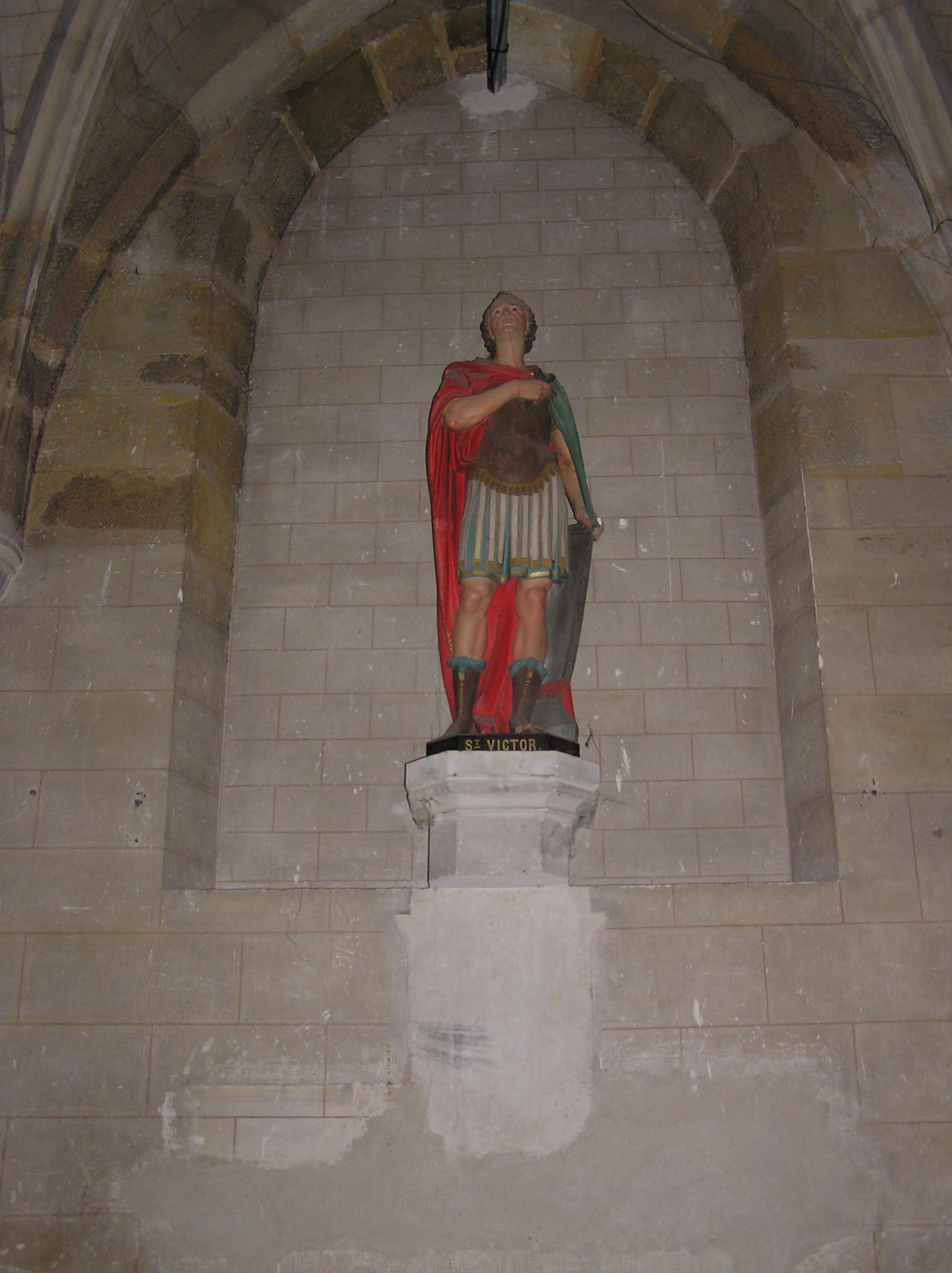 Sculpture de Saint Victor